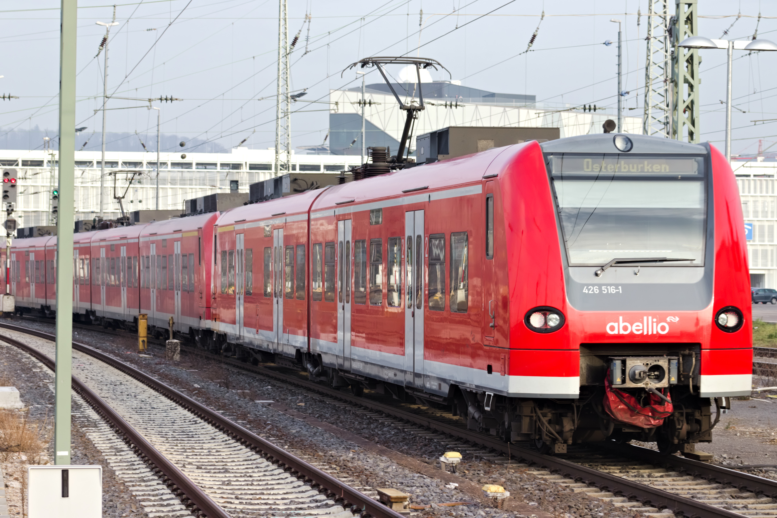 DB 426 016/516-1 betrieben von Abellio verlässt als RB 18 (19322) den Hauptbahnhof Heilbronn.